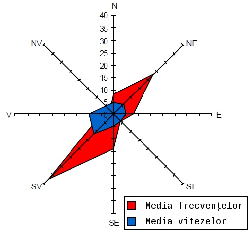 Roza vânturilor, cu reprezentare vitezelor şi frecvenţelor medii ale vânturilor într-o locaţie